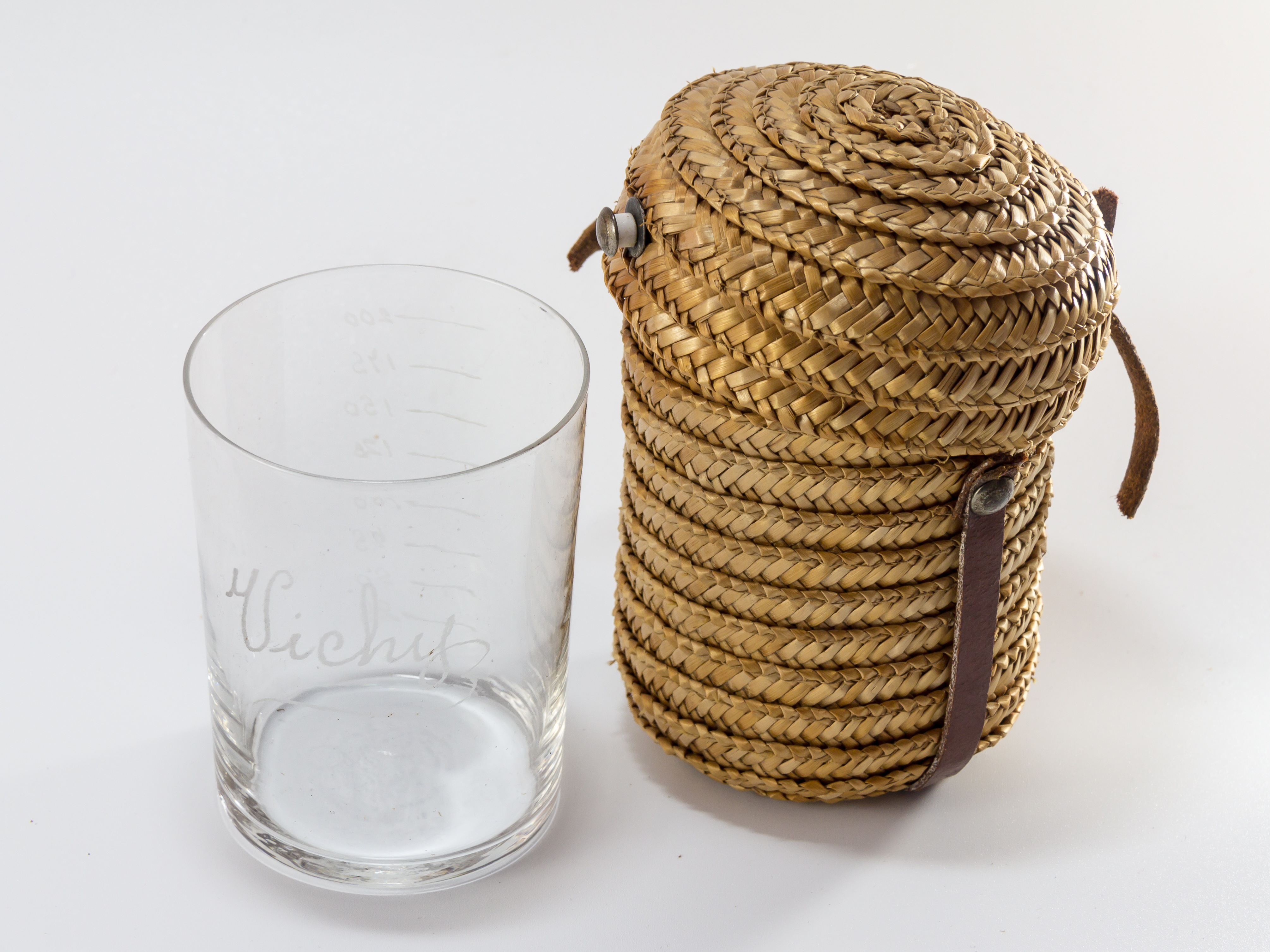 Reise-Trinkbecher für die Trinkkur aus Vichy, 1. Hälfte 20. Jahrhundert